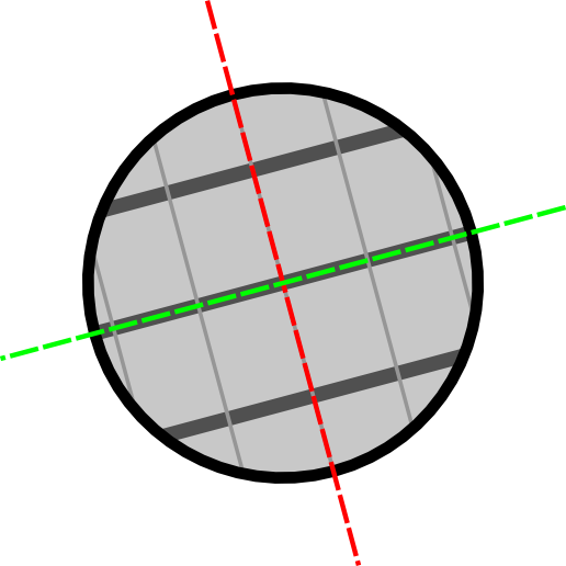 Bild zur Erklärung von Orthotropie